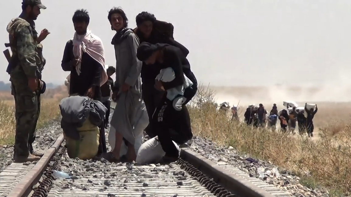 Réfugiés syriens regagnant Tell Abyad|Tell Abyad, c. 24 juin 2015.